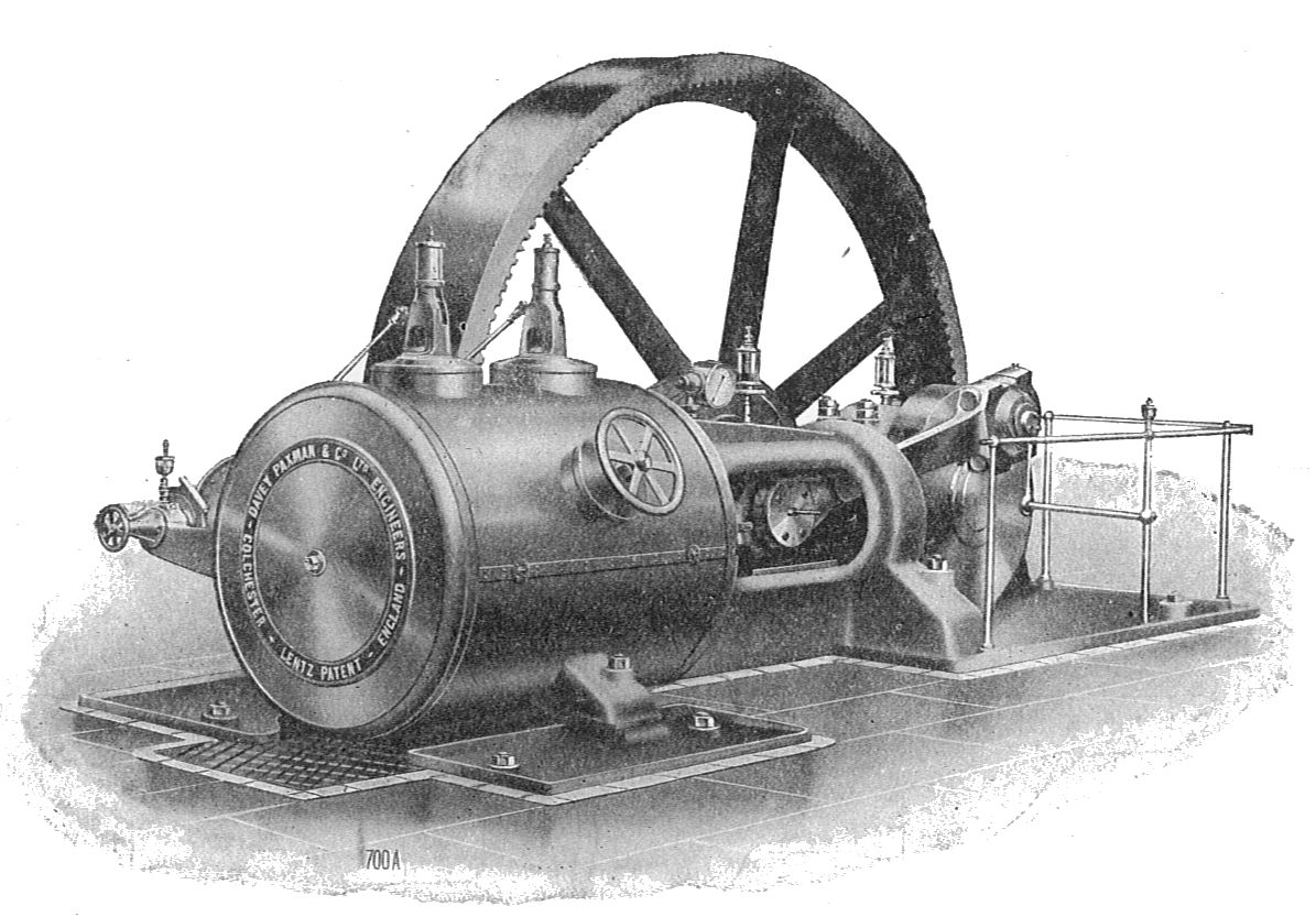 Paxman-Lentz single-cylinder engine (Rankin Kennedy, Modern Engines, Vol IV).jpg